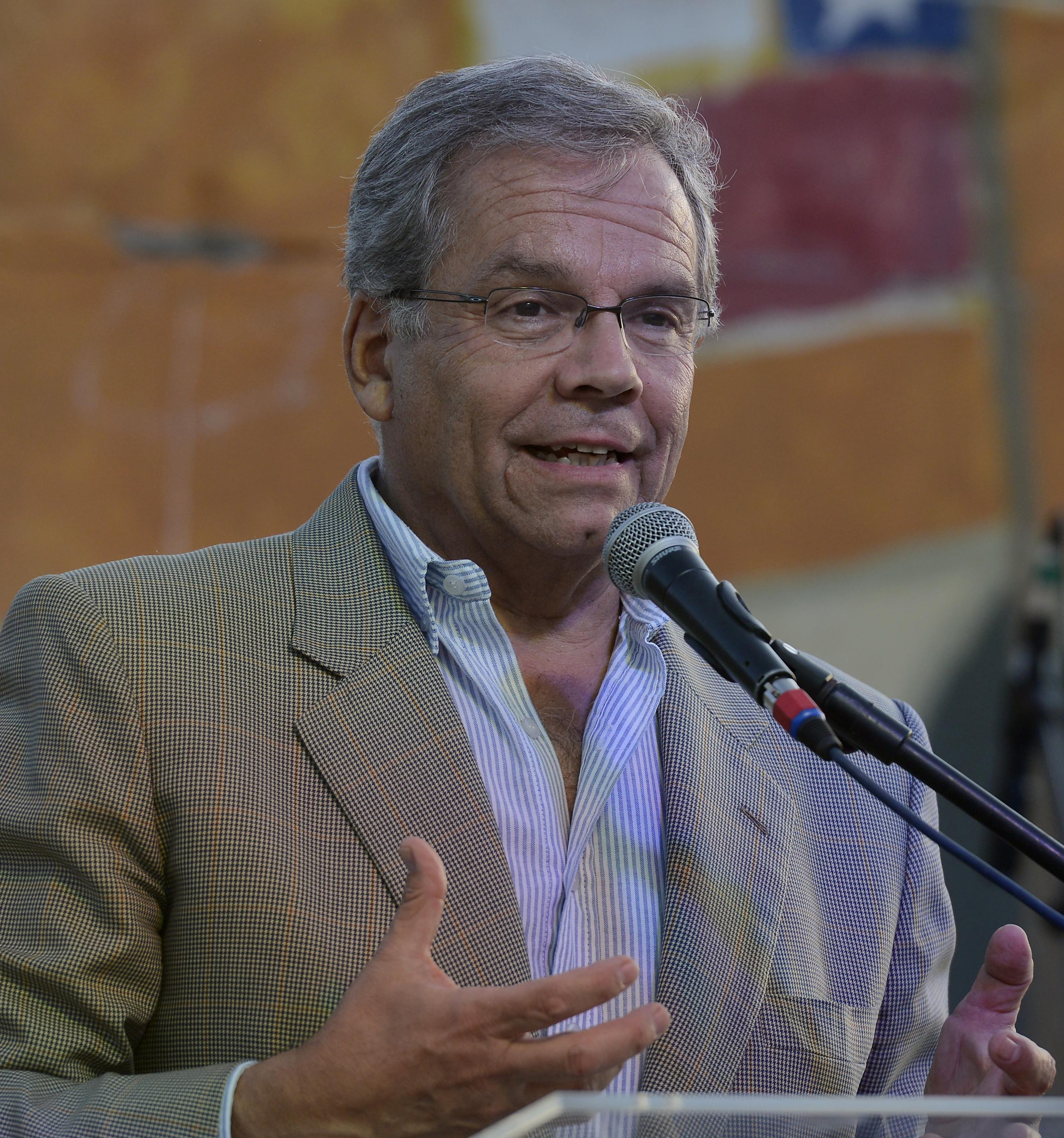 Raúl Donckaster, alcalde de La Reina.